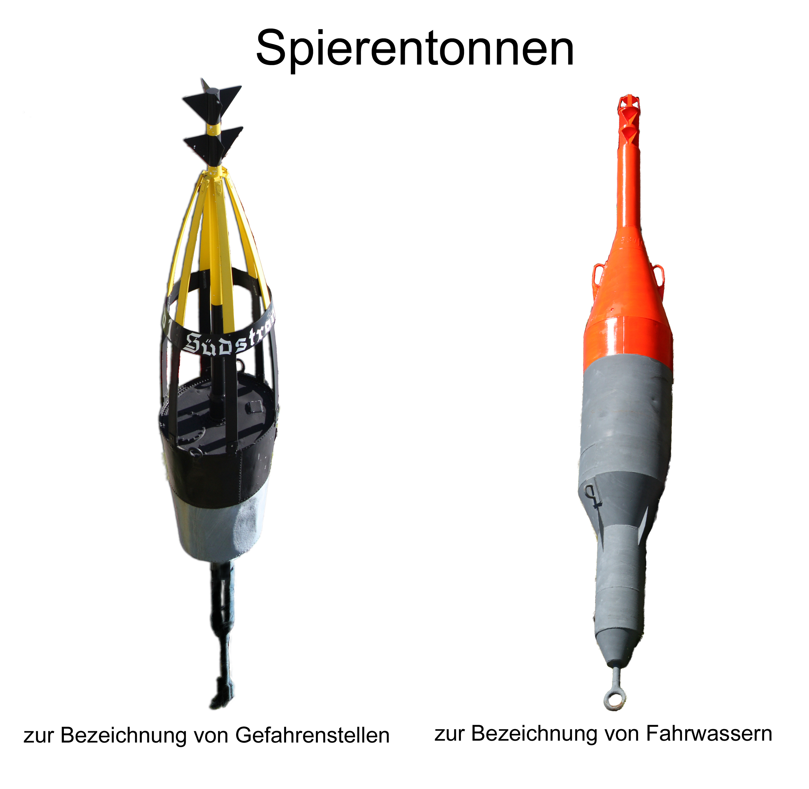 Die Abbildung zeigt zwei Spierentonnen, die Gelbschwarze als Teil des Kardinalsystems, die Rote zur Fahrwassermarkierung